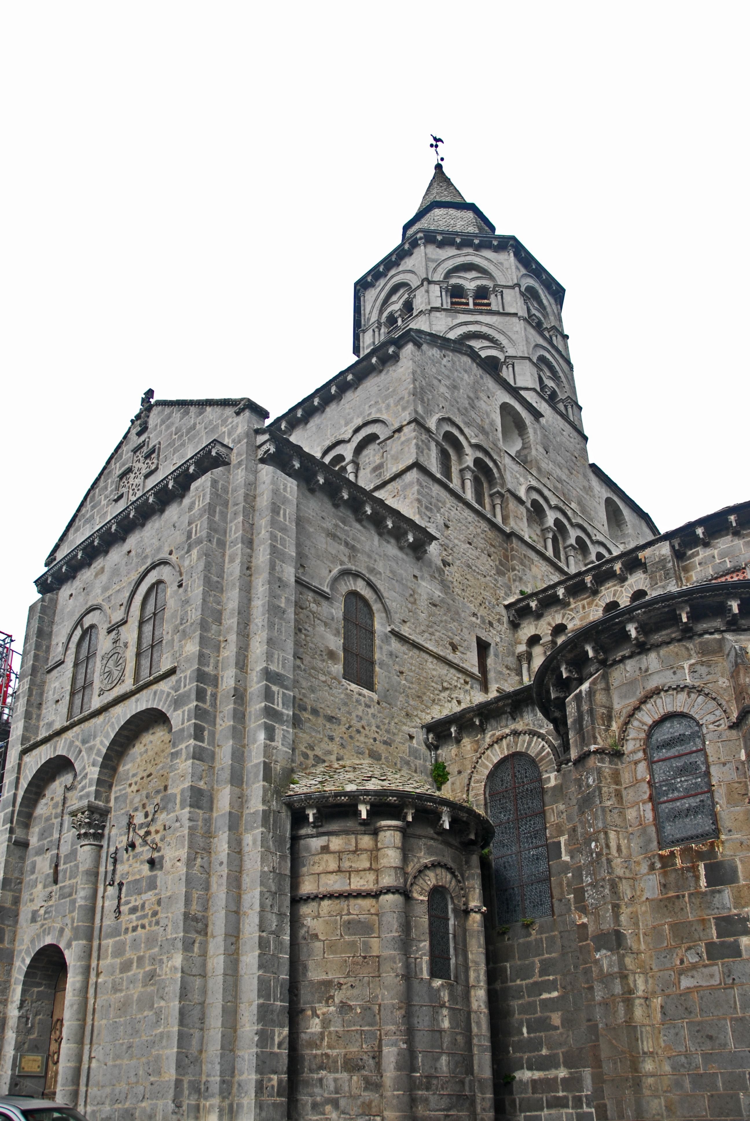 N.-D. d'Orcival, Chorhaupt von SO